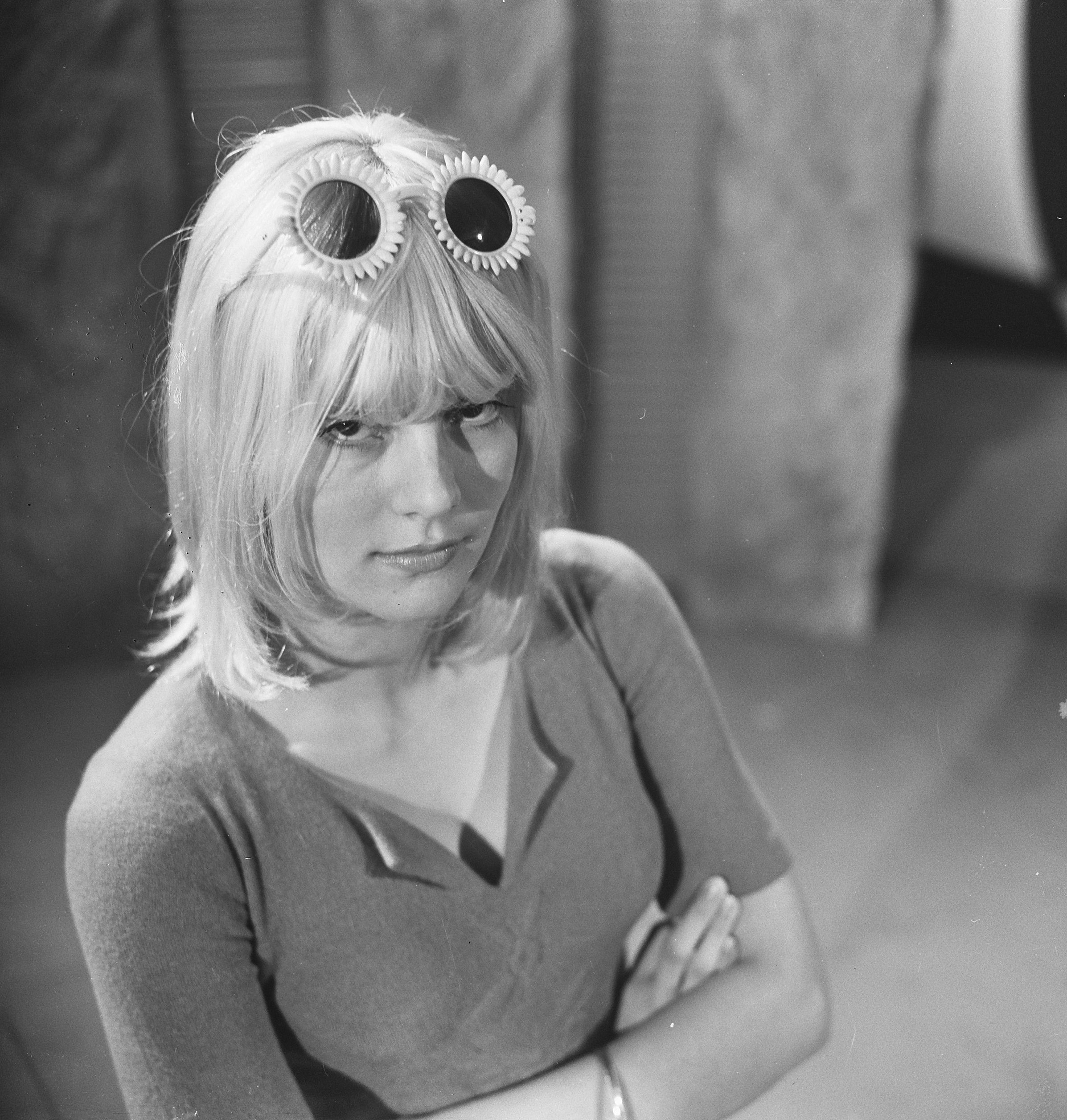 Collectie / Archief : Fotocollectie Anefo Reportage / Serie : [ onbekend ] Beschrijving : Sylvie Vartan (Frans zangeresje) getrouwd met Johny Hallyday Annotatie : AVRO Televisie; opnamen programma Tienertheater, uitgezonden op 26 maart 1966 Datum : 11 maart 1966 Trefwoorden : portretten, zangers, zonnebrillen Persoonsnaam : Vartan, Sylvie Fotograaf : Koch, Eric / Anefo Auteursrechthebbende : Nationaal Archief Materiaalsoort : Negatief (zwart/wit) Nummer archiefinventaris : bekijk toegang 2.24.01.03 Bestanddeelnummer : 918-9046